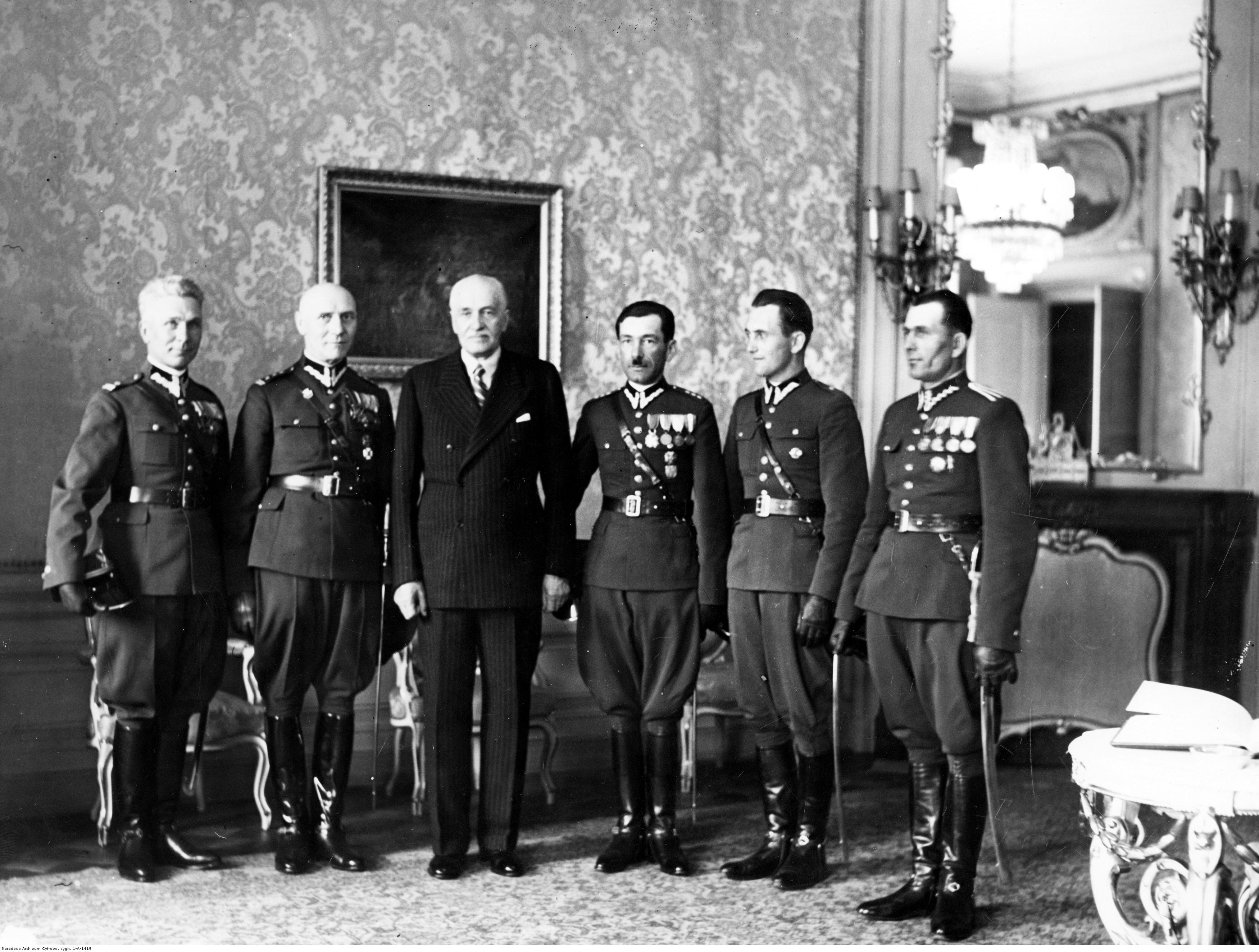 Wręczenie prezydentowi RP Ignacemu Mościckiemu odznaki pułkowej przez delegację 9 Pułku Artylerii Ciężkiej 16 maja 1938 r. Koncern Ilustrowany Kurier Codzienny - Archiwum Ilustracji. Sygnatura: 1-A-1419